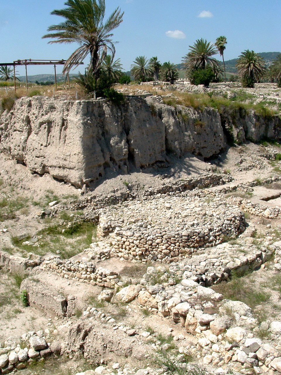 Tell Megiddo תל מגידו Circular altar-like shrine Migron 4040 המזבח העגול מקדש דמוי מגרון 4040